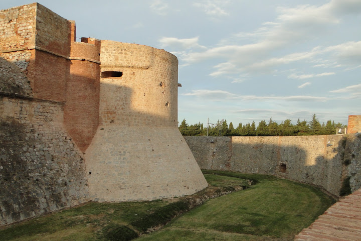 Крепостная стена